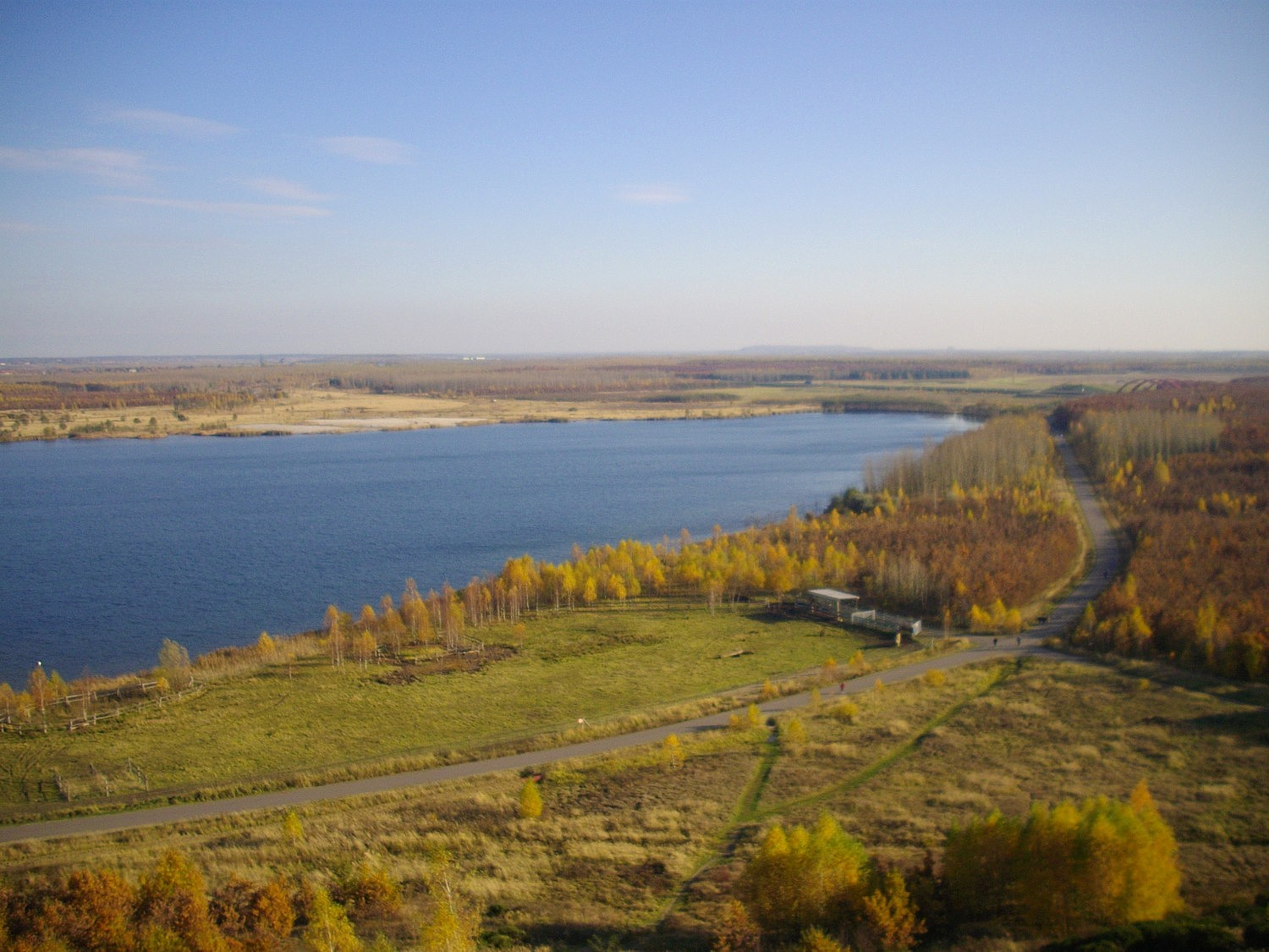 Cospudener See und Neue Harth vom Aussichtsturm Bistumshöhe aus gesehen, Gemarkung Zwenkau, bei Markkleeberg, Landkreis Leipzig